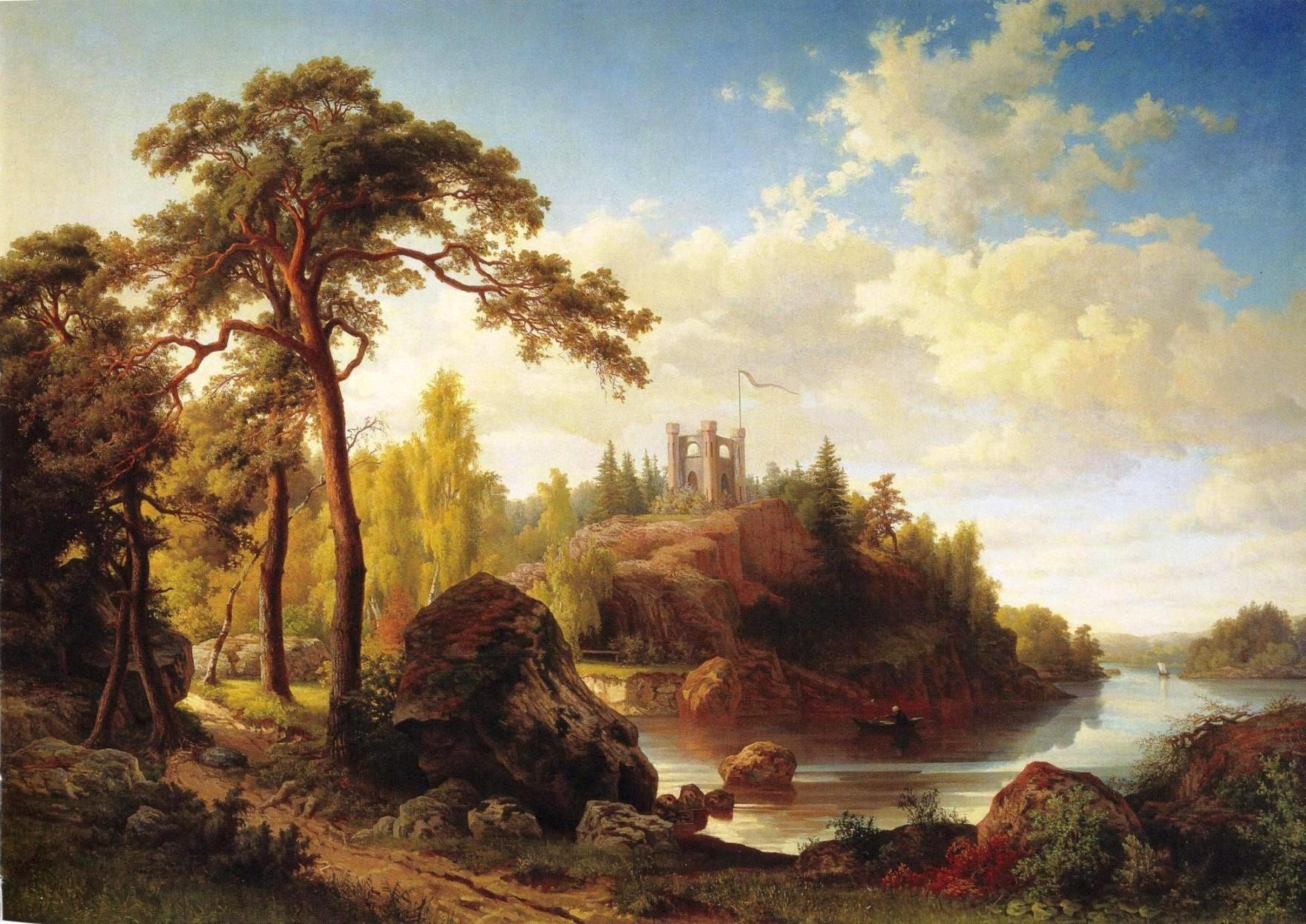 Victoria Åbergin maisemamaalaus Monrepos'n puistosta Viipurissa. Taustalla Ludwigsteinin saari ja Ludwigsburgin hautakappeli. Maalaus ostettiin vuonna 1867 Helsingin keisarilliseen palatsiin (nyk. Presidentinlinna), jossa se edelleen sijaitsee. Maalaus on sijoitettu Presidentinlinnan ruokasaliin.